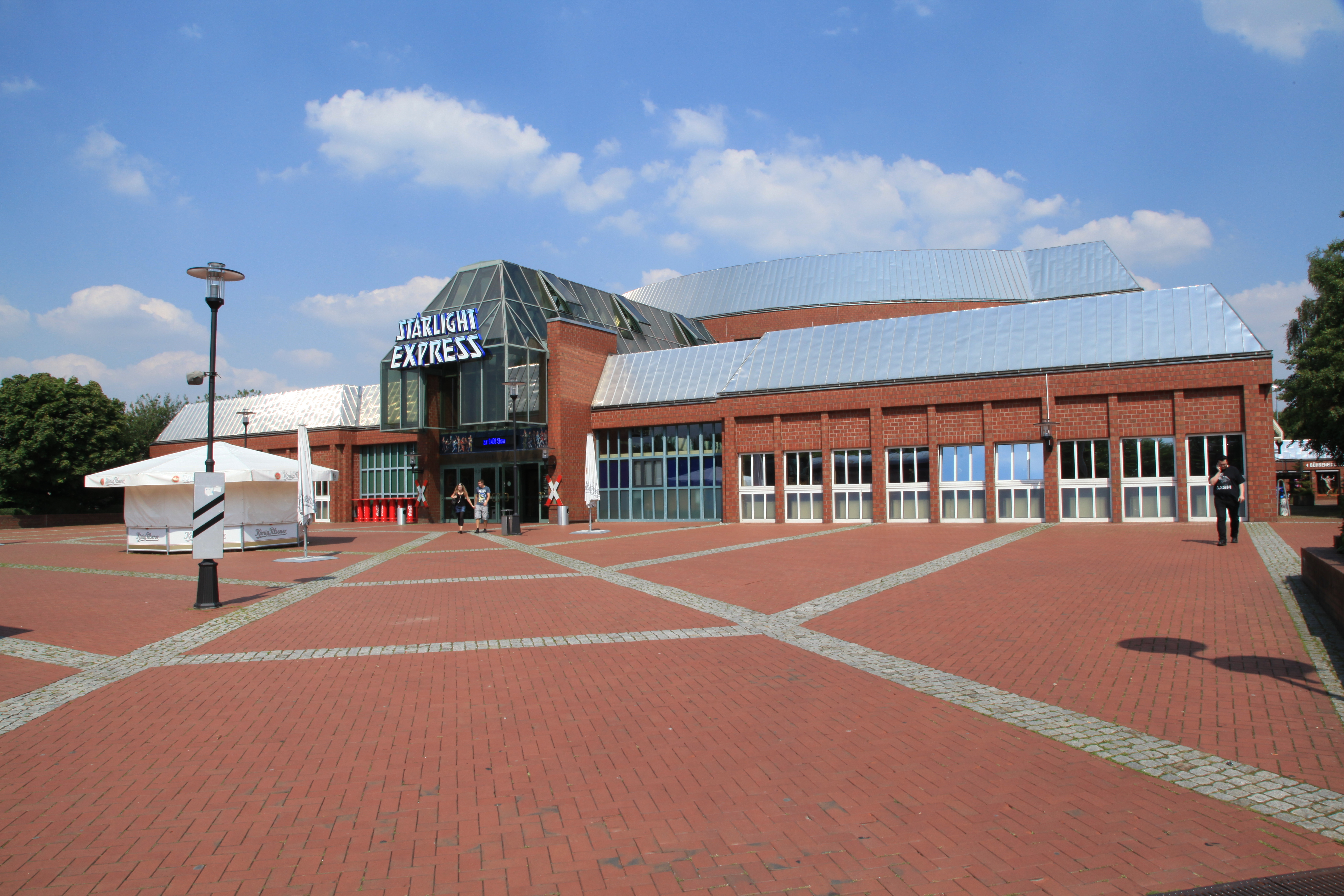 Starlight Express Theater, Stadionring 24 in Bochum